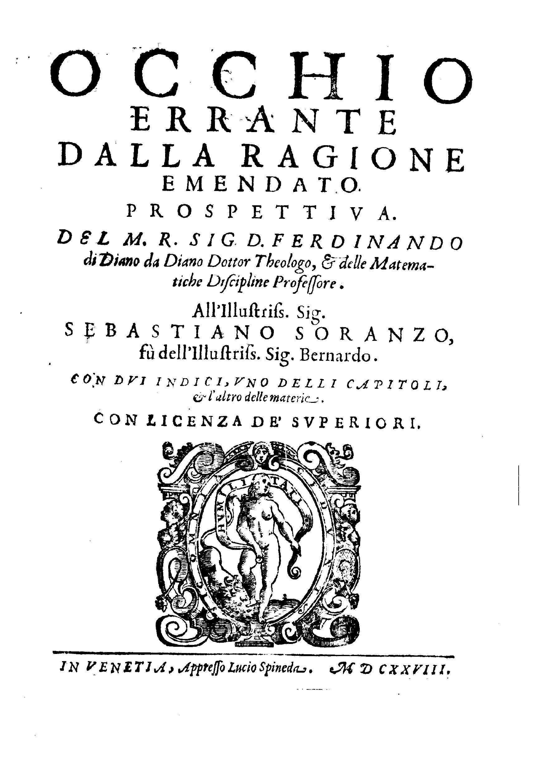 Occhio errante dalla ragione emendato. prospettiua del m. r. sig. d. Ferdinando di Diano .... - In Venetia : appresso Lucio Spineda, 1628. - [12], 223, [9] p. : ill. ; 4º .